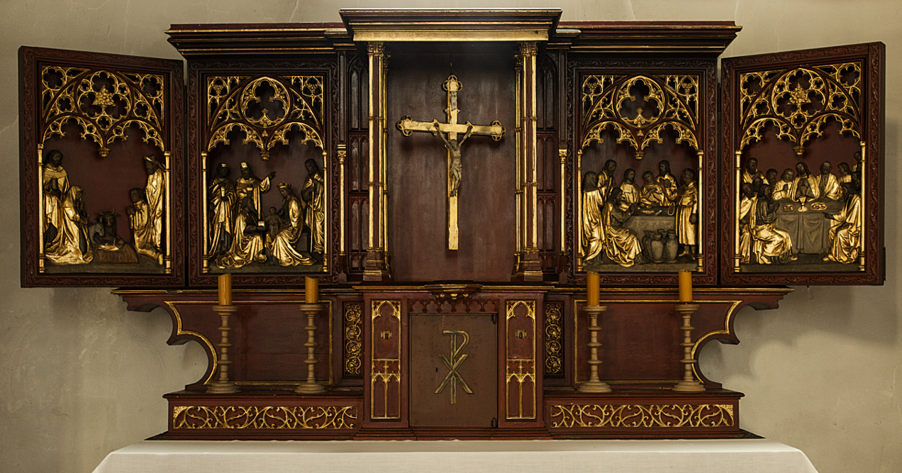 Ehemaliger Hochaltar St. Agatha Aschaffenburg